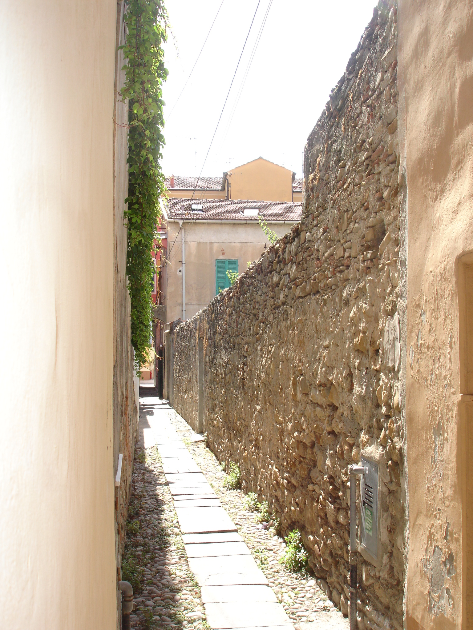 Autore: Tony Frisina